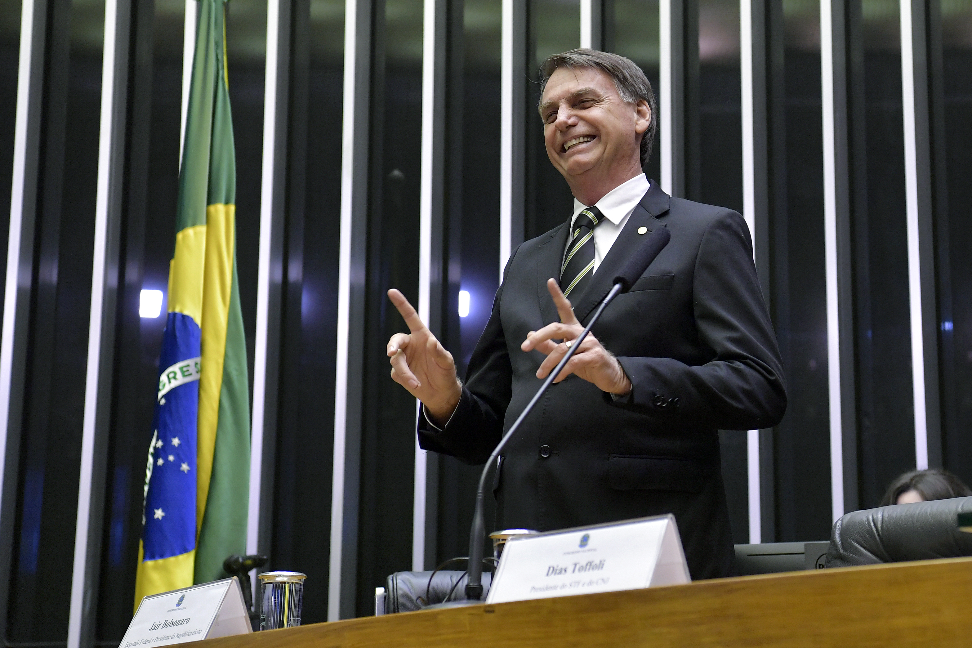 Plenário da Câmara dos Deputados durante sessão solene do Congresso Nacional destinada a comemorar os 30 anos da Constituição Cidadã.Em destaque, presidente da República eleito, Jair Bolsonaro. Foto: Marcos Brandão/Senado Federal